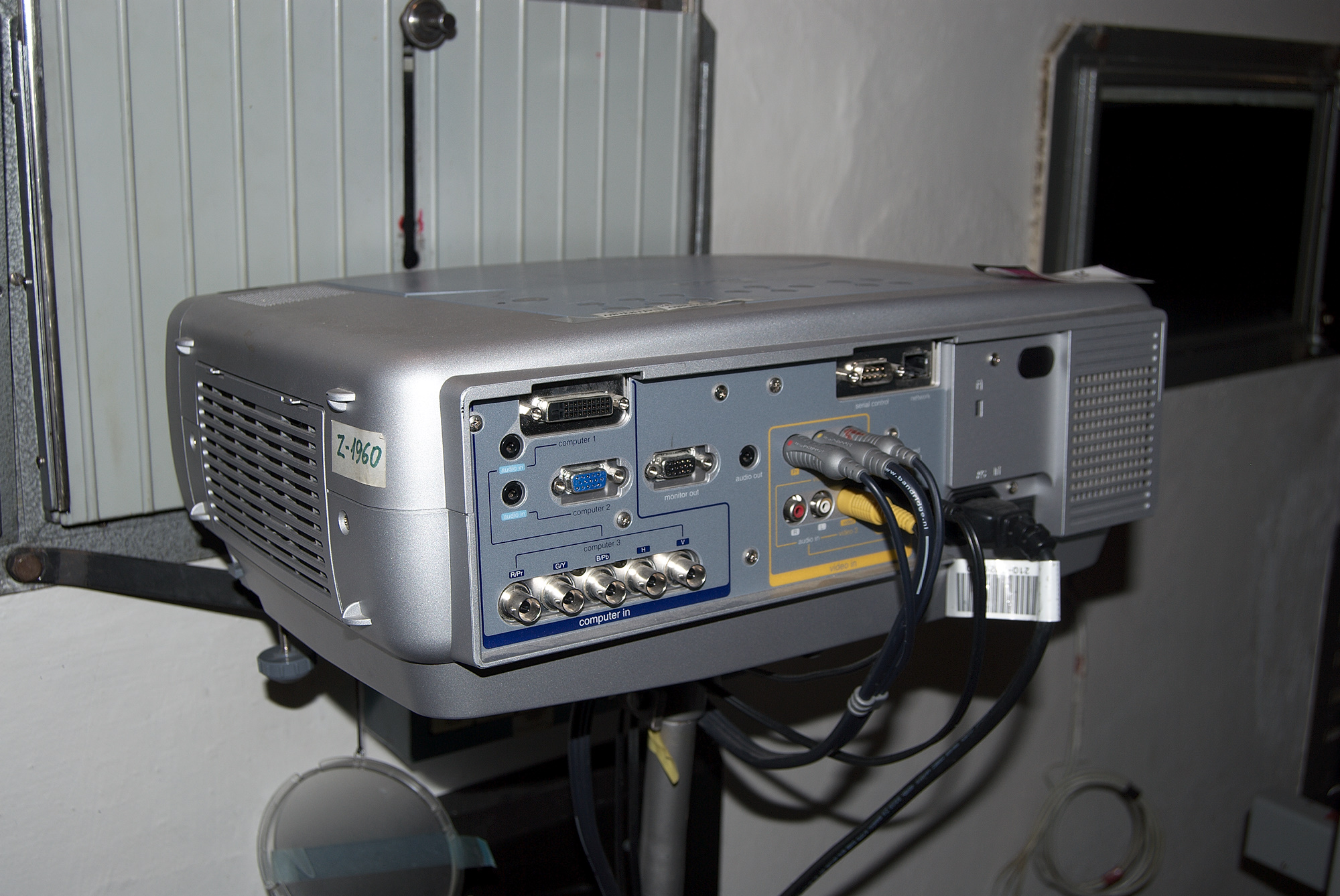 Brněnské kino Scala - dataprojektor